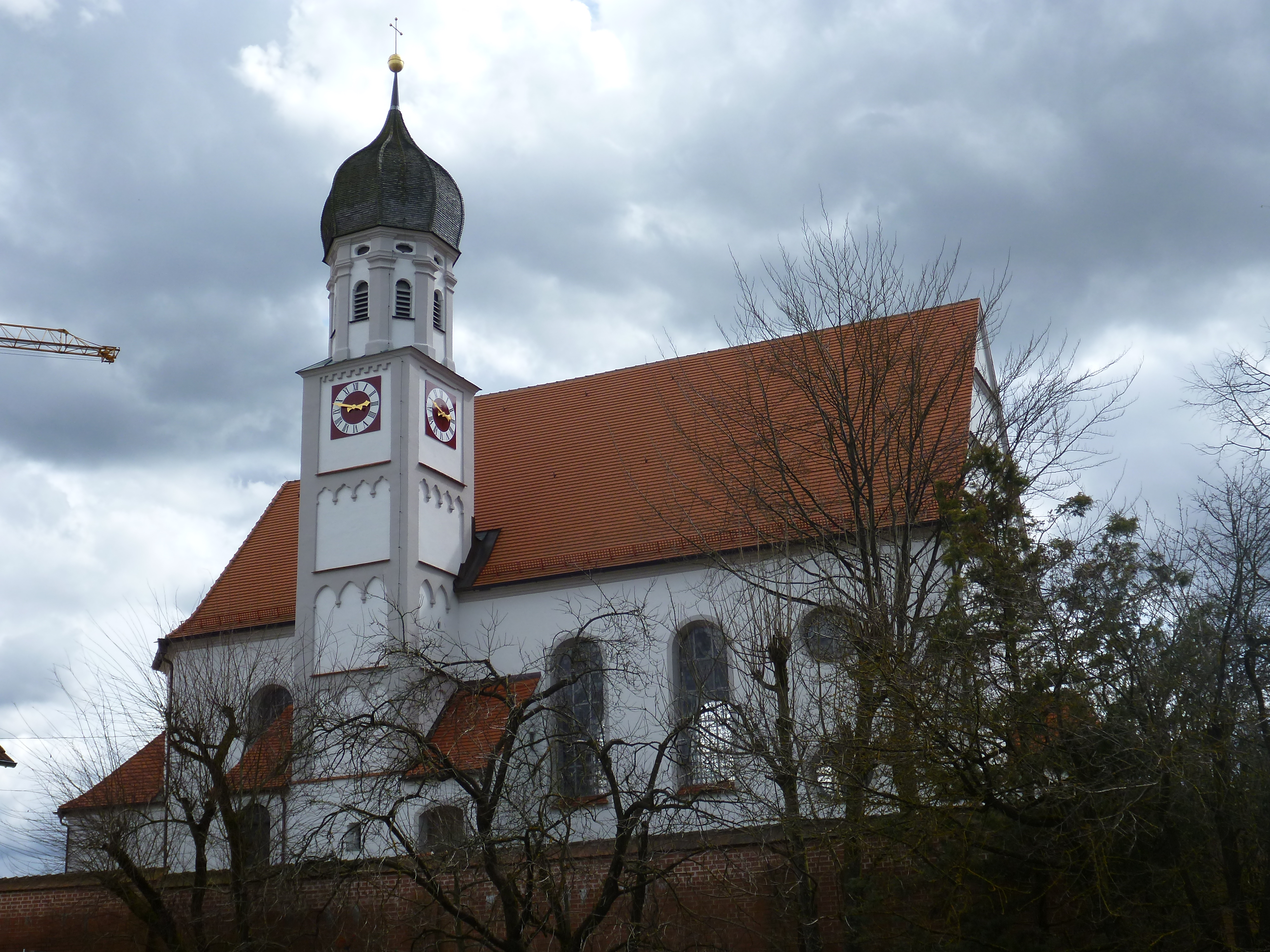 Außenansicht